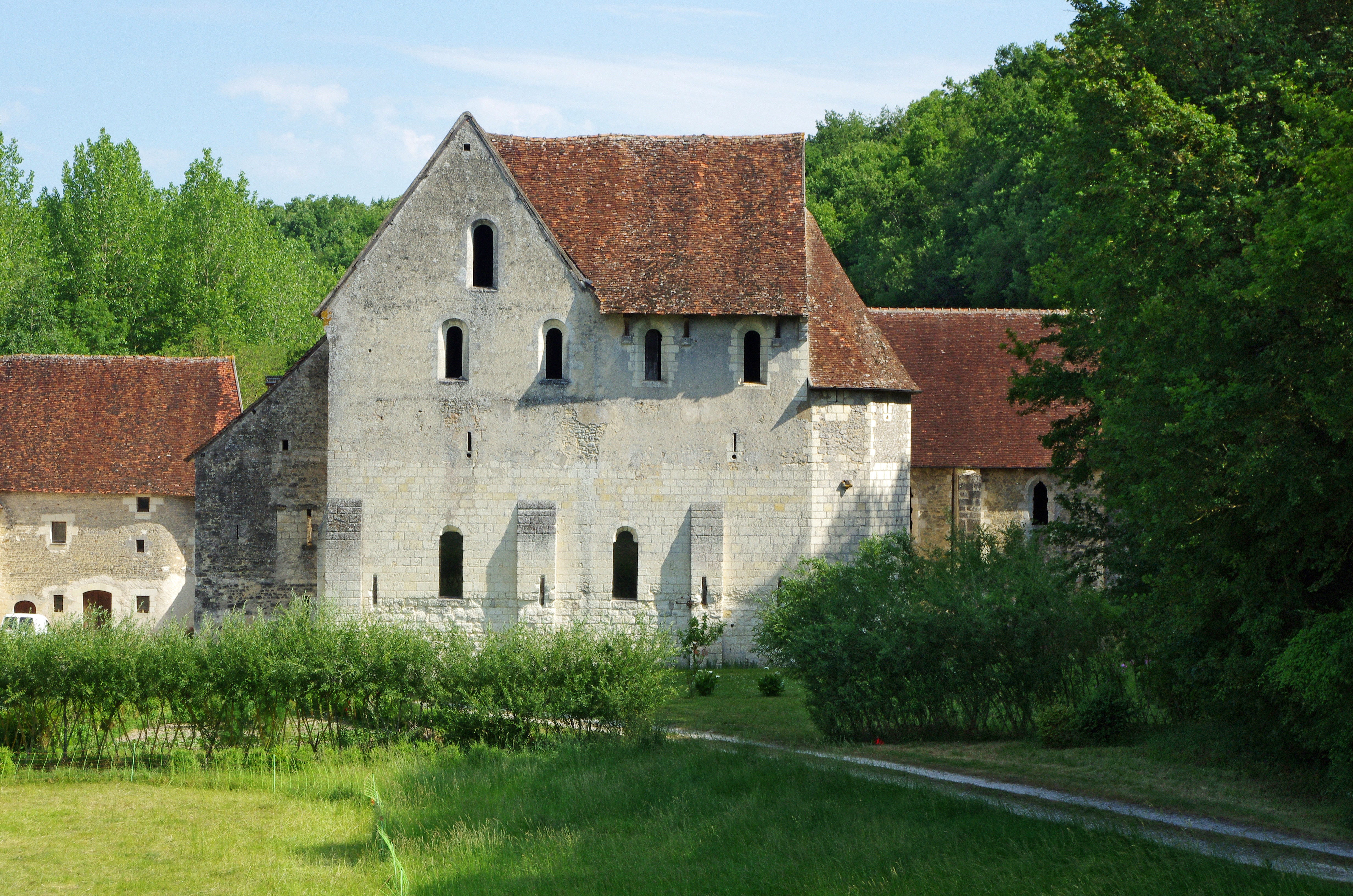 Chemillé-sur-Indrois (Indre-et-Loire) La Corroirie. Fief féodal, seigneurie et monastère des frères chartreux, à l'orée de la forêt de Loches. Ancienne dépendance de la Chartreuse du Liget, à 800 mètres de celle-ci en suivant le ruisseau du Liget vers l'aval, en dessous d'un étang, la Corroirie est lieu féodal de la Chartreuse et refuge des religieux en cas de troubles. Afin de préserver la tranquillité des pères chartreux, leur domaine de plus de 1500 hectares, était administré depuis la Corroirie par le père procureur et les frères chartreux. Son pont-levis, ses douves et ses fortifications en font une place forte. Une des portes est intacte, reconstruite au XVe siècle, elle se présente sous la forme d'une tour carrée, pourvue d'un chemin de ronde protégé par des mâchicoulis, percée d'une porte et d'une poterne autrefois défendues par des ponts-levis. La chapelle date de des XIIe-XIIIe siècles, mais elle a été surélevée au XVe siècle de deux étages, dont le premier est muni de meurtrières. Elle comprend une nef à deux travées prolongée par une abside à quatre pans. Elle conserve l'allure militaire de l'ensemble, mais est dans style Plantagenet à l'intérieur. Elle comprend une nef à deux travées prolongée par une abside à quatre pans. La prison est une tourelle isolée des autres bâtiments. Son unique accès se faisait par une porte percée à l'étage, la cellule se trouvant au rez-de-chaussée.